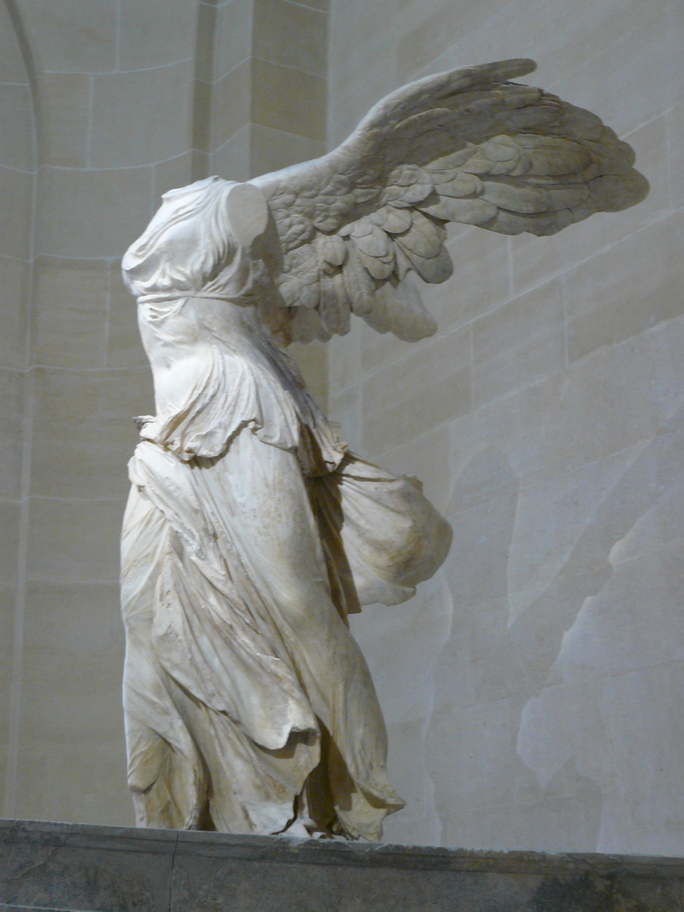 Détail de la statue en vue de gauche. On peut y voir la finesse des drapures en marbre.